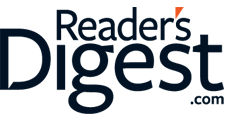 Readers Digest New Logo